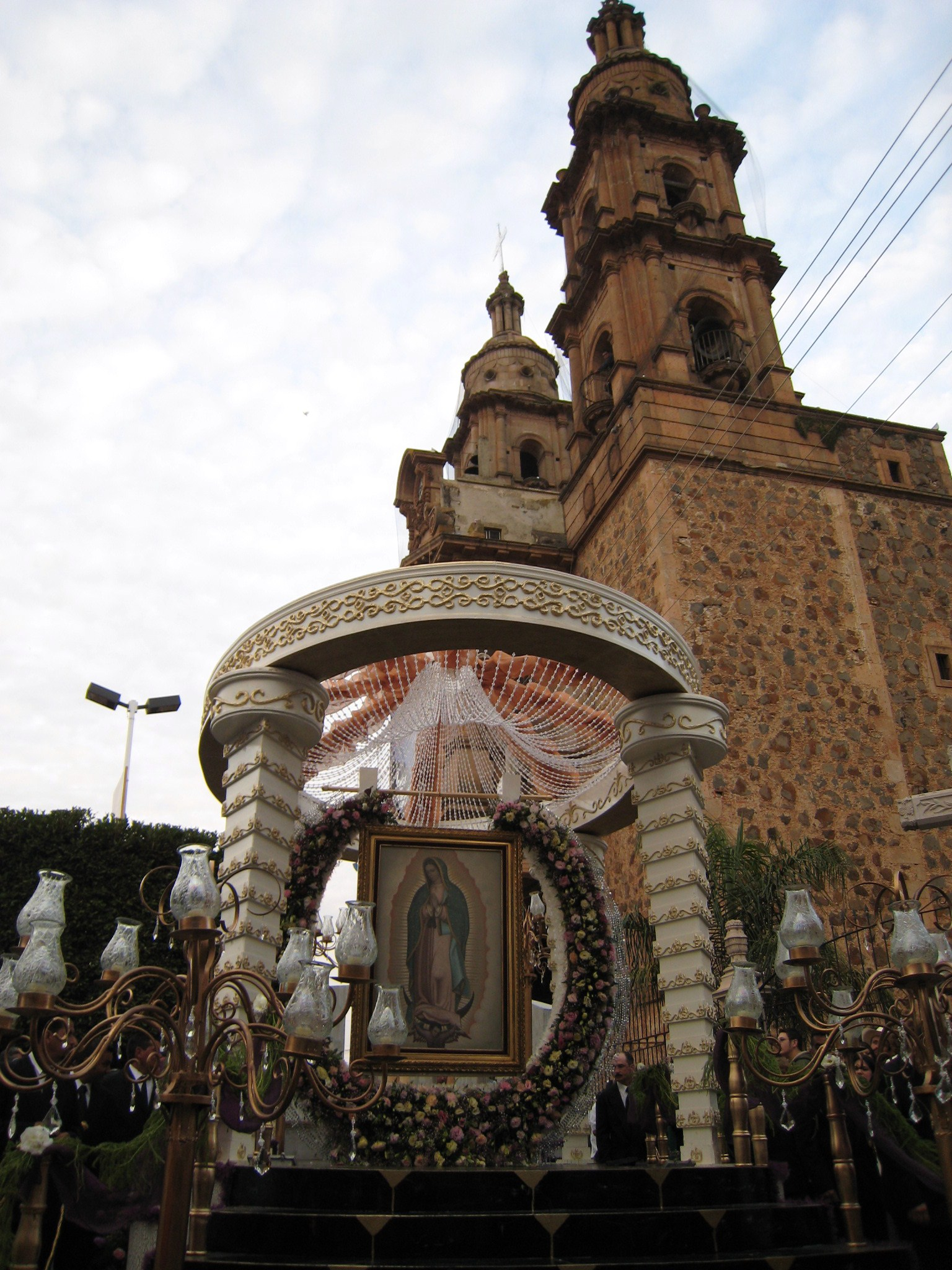 Carros alegóricos en la fiesta patronal de Capilla de Guadalupe Jalisco.